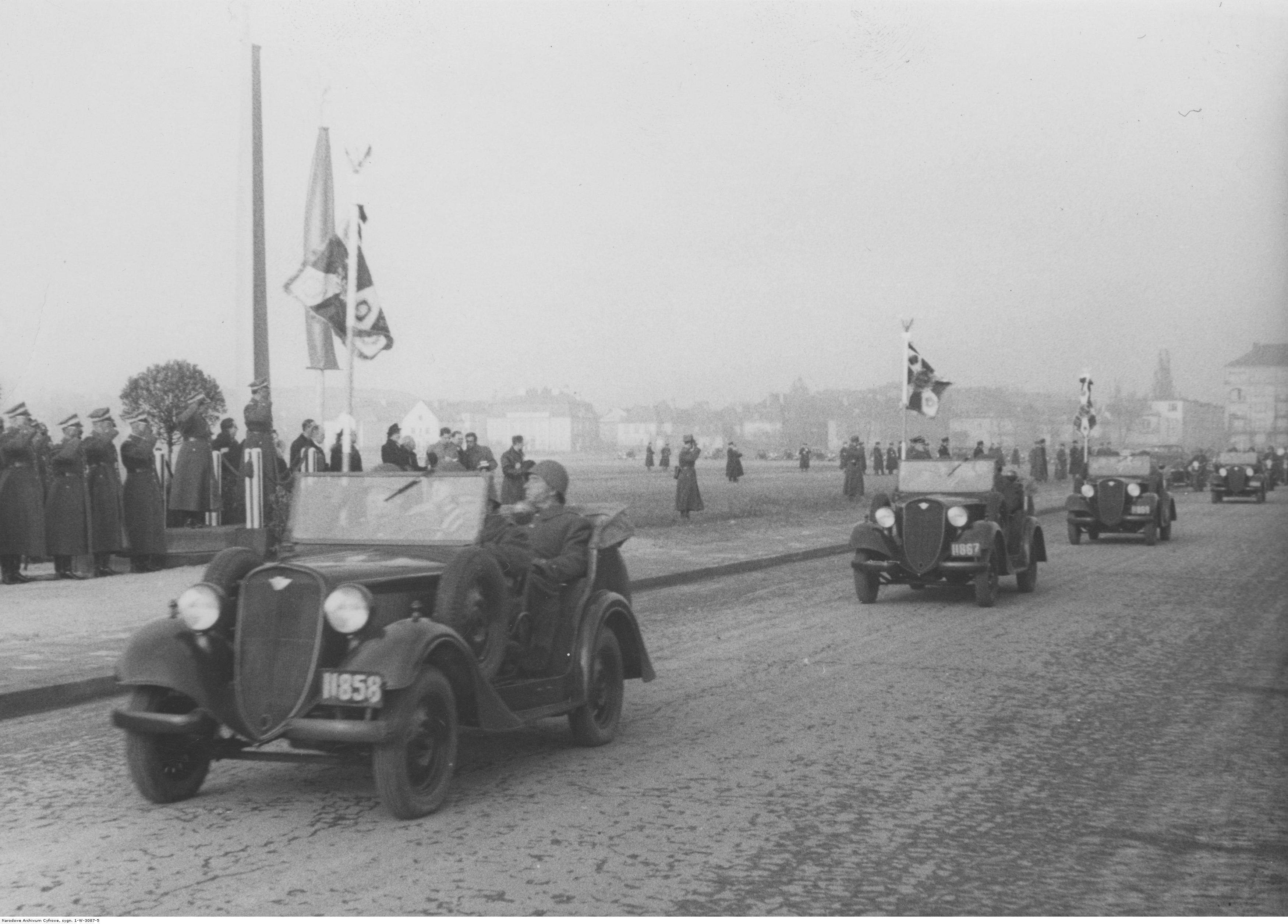 Wręczenie sztandarów artylerii przeciwlotniczej - defilada pocztów z wręczonymi sztandarami. Poczty jadą samochodami Łazik; listopad 1938. Koncern Ilustrowany Kurier Codzienny - Archiwum Ilustracji. Sygnatura: 1-W-3087-5